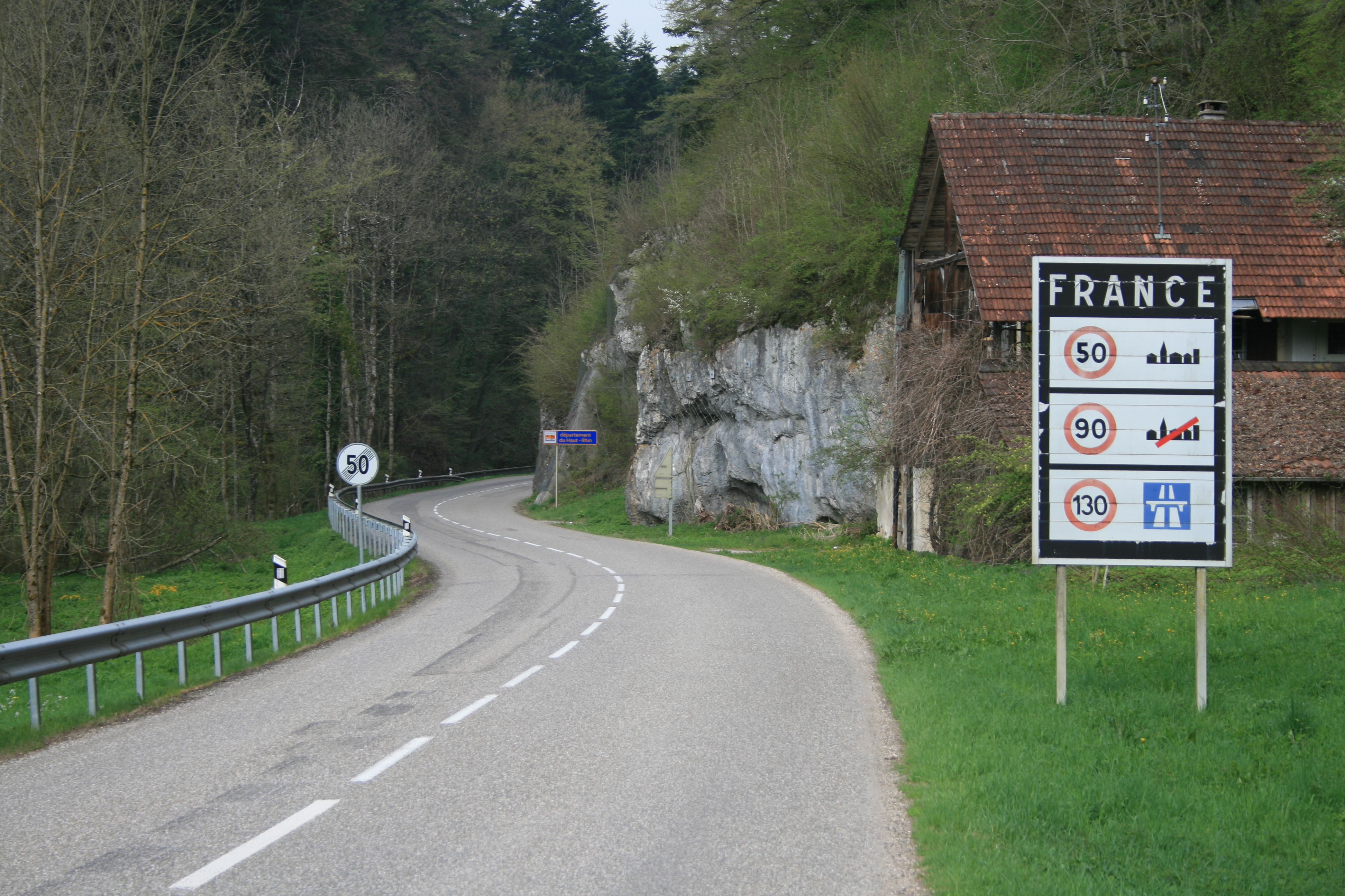 Im Tal der Lützel/Lucelle